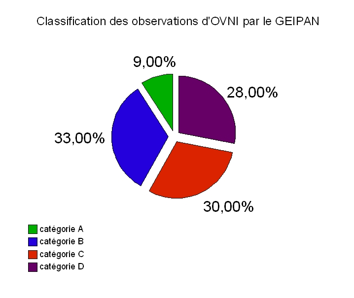 classification des différentes observations d'OVNI par le GEIPAN